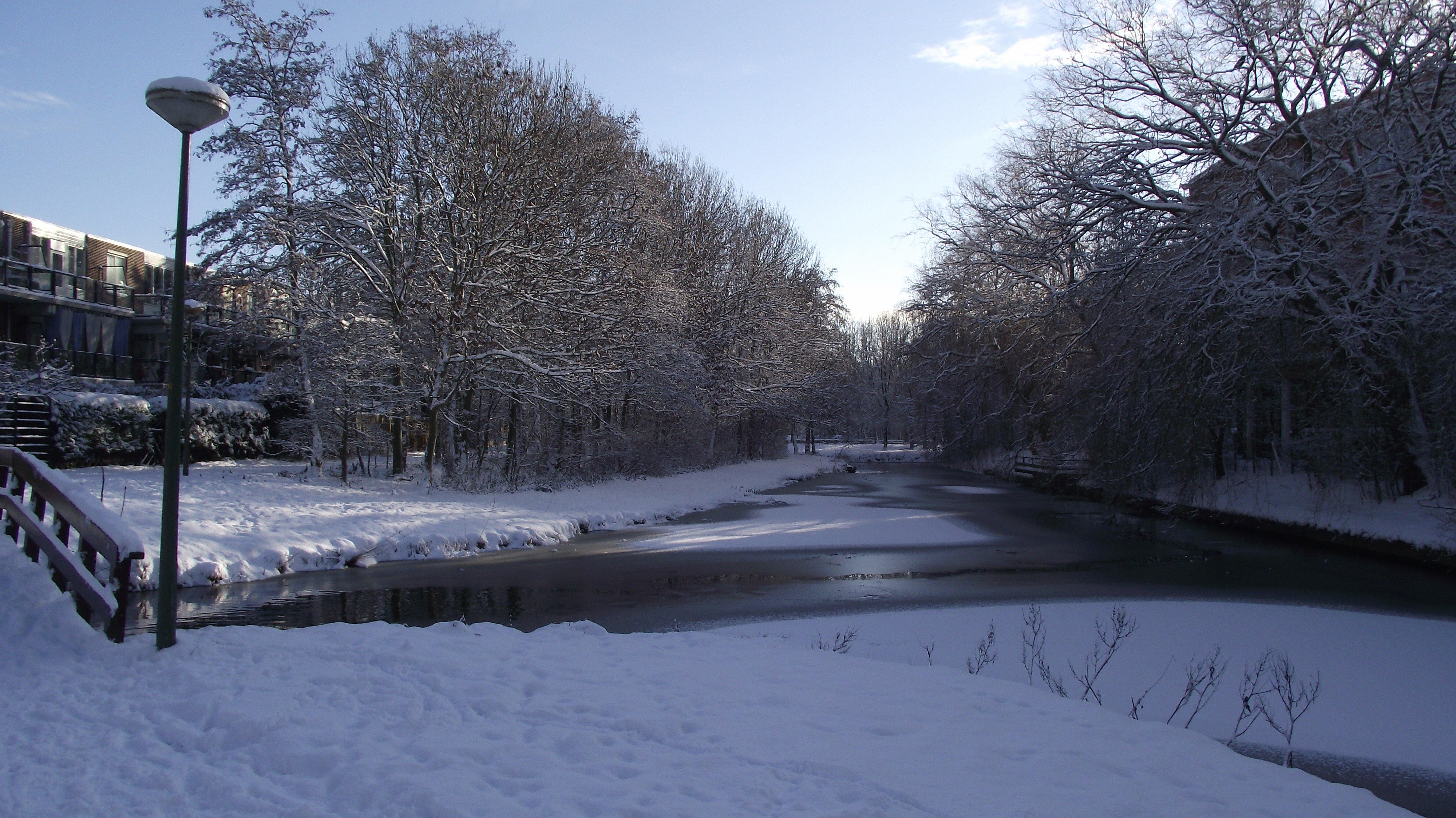 Sneeuw in december 2010 in Houtwijk